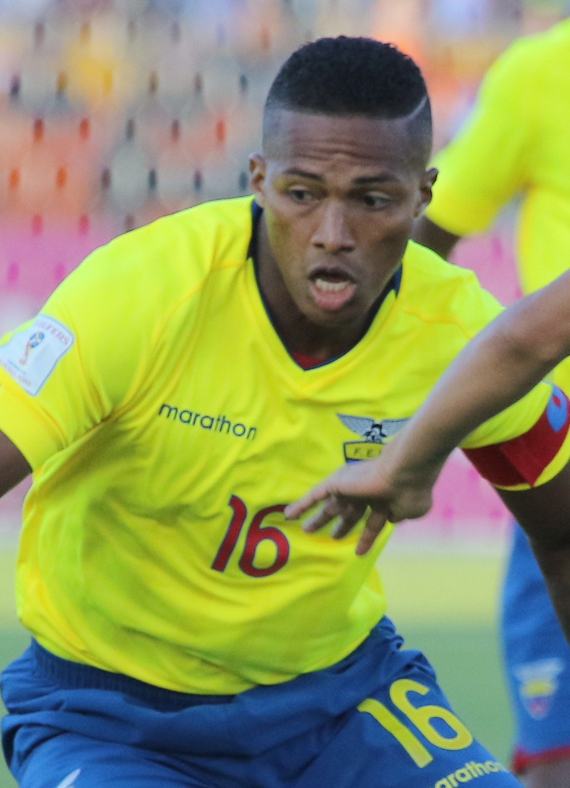 Quito 5 Sep (Andes).- Encuentro por eliminatorias Rusia 2018 entre Ecuador y Perú. Fotografías: Carlos Rodríguez/Andes.